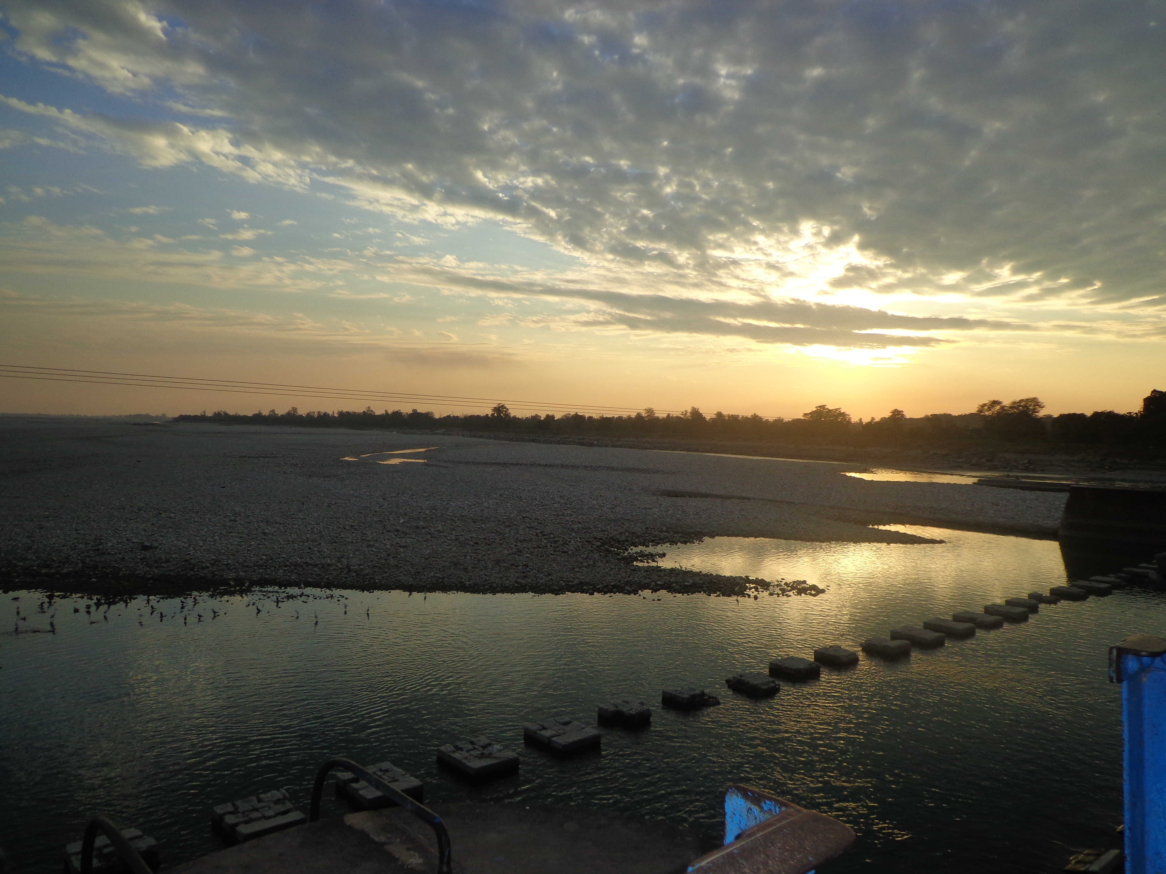 Banbasa Canal Range, Uttarakhand, India